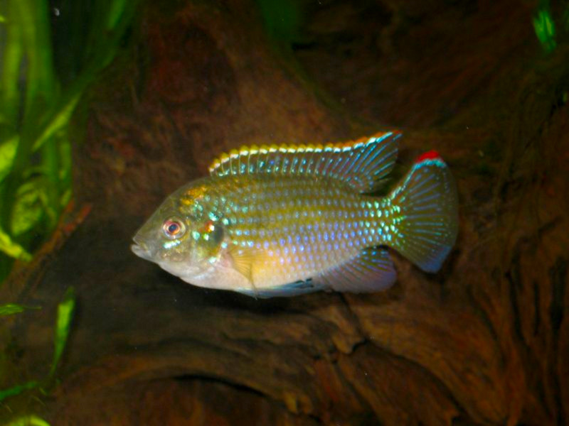 Afrikanischer Schmetterlingsbuntbarsch (Thomas Prachtbarsch, Anomalochromis thomasi), Männchen.